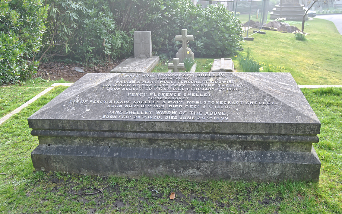 Lugar donde descansa los resto de Mary Shelley. En el mismo Lugar descansa parte de su familia e hijo Percy Florence.